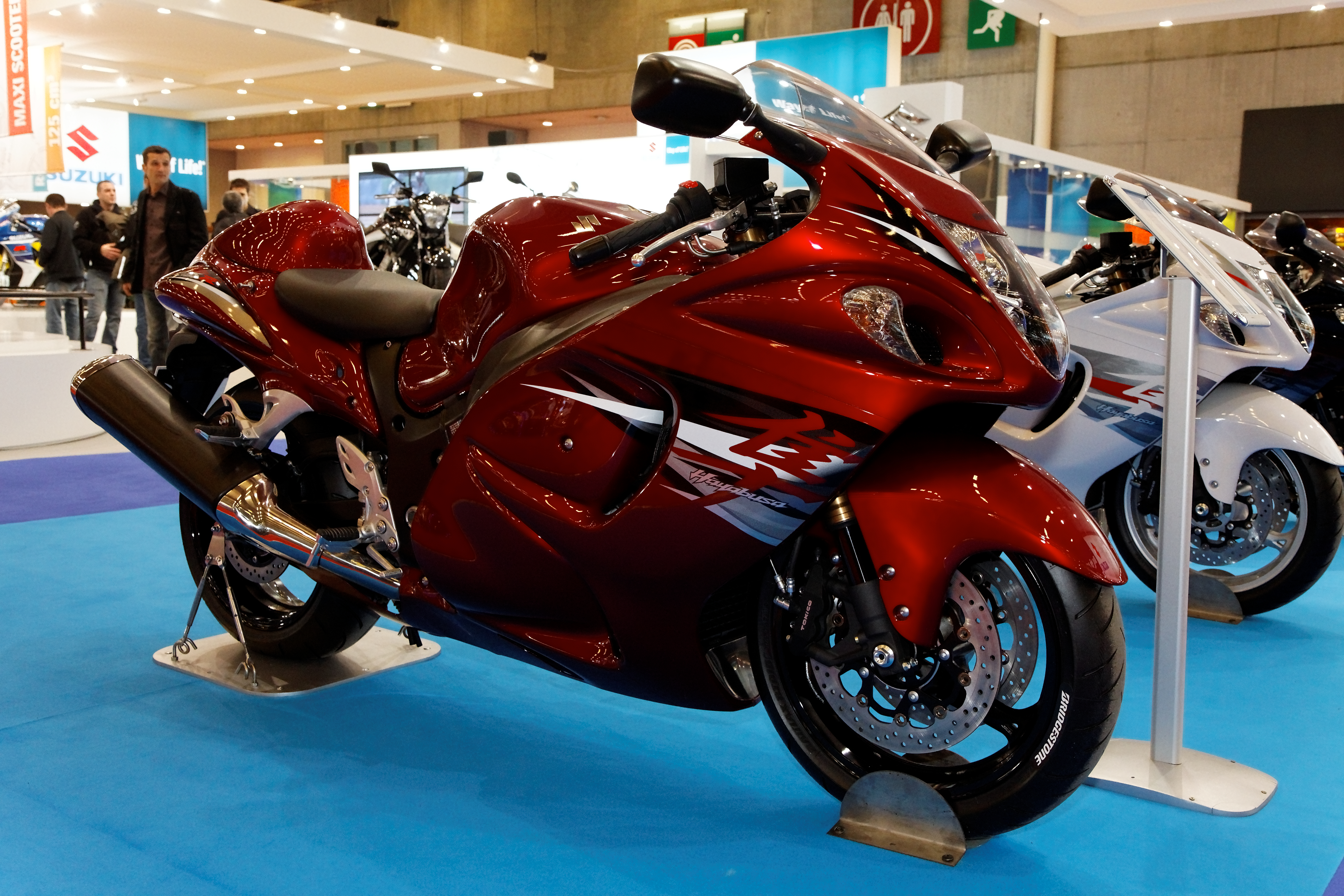 Suzuki - Hayabusa